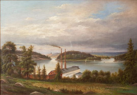 Nedanför berget vid Alviks strand syns byggnaderna till Lars Montén & Co:s stearinljusfabrik år 1884. Från innerstaden till Alvik: Fabriken låg tidigare mitt inne i Stockholm, vid Klara Bergsgränd 43, där Stockholms Centralstation nu ligger. Den hette då Clara Tekniska fabrik och ägdes av fabrikören och grosshandlaren Lars Montén (1785-1872). Efter riksdagsbeslut 1862-63 om att dra en sammanbindningsbana genom Stockholm väntade expropriationsdomar. Montén flyttade därför verksamheten till Alvik sedan han köpt in såväl Alviks som Äppelvikens gårdar. Här vid Mälarstranden uppförde han sin fabrik år 1864. Kontor och försäljningsbod fanns på Stora Nygatan 19 i Gamla stan, förbindelserna mellan Alvik och staden ordnades med eget ångfartyg. Efter Lars Monténs död 1872 övertogs fabriken av släktingar. I slutet av 1920-talet såldes Lars Monténs fabrik till Barnängens Tekniska fabrik som då flyttade till Alvik från Bondegatan. Fri sikt in mot staden: Där konstnären Ehrenfried Wahlqvist (1815-1895) stod och målade år 1884 klättrar nu stora kontorskomplex. Då var det en lantlig idyll långt från stadens vimmel. Från sin plats på berget hade konstnären fri sikt dels in mot staden, dels söderut. Mellan Kungsholmslandet till vänster och Lilla Essingen mitt på målningen syns norra delen av Långholmen och längre bort ett gytter av hus på Södermalms norrsluttning mot Riddarfjärden. Längst bort i diset Katarina kyrkas ståtliga kupol som reser sig ovanför hustaken. Sommarhus på Essingeöarna: På Lilla Essingen var det glest mellan byggnaderna, bara några enstaka sommarnöjen och ett varv. Till höger skymtar Stora Essingen, också det en populär ö för sommarhus. I gattet mellan Lilla och Stora Essingen syns Reimersholme. Det blåser en lätt sydlig vind och Mälarens vattenspegel ligger blank med några ångbåtar och båtar med segel.